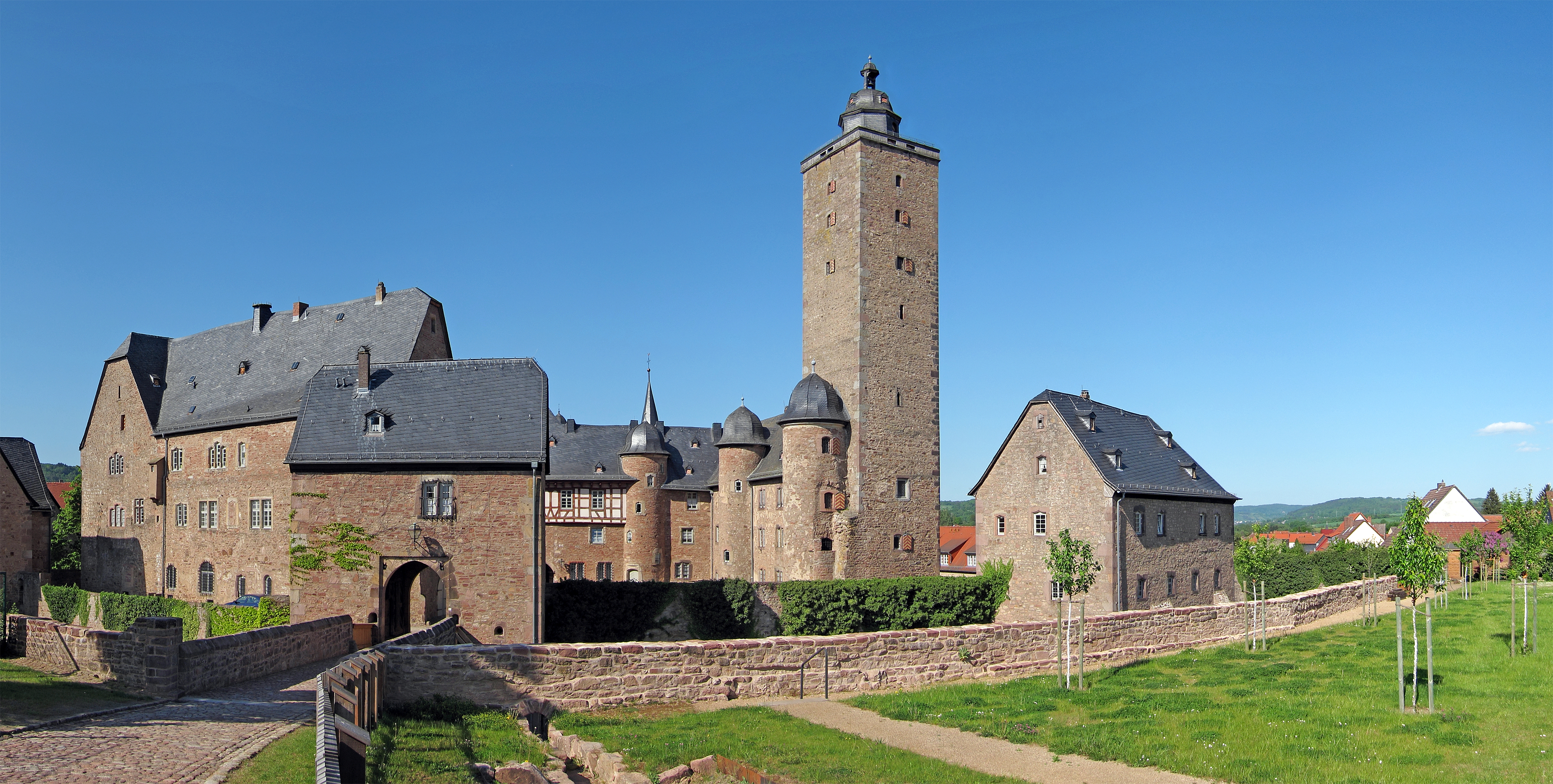 Schloss Steinau, im hessischen Steinau an der Straße gelegen, entstand in mehreren Bauabschnitten überwiegend im 16. Jahrhundert und diente den Herren und Grafen von Hanau als Nebenresidenz. Es handelt sich um die größte und am besten erhaltene Schlossanlage der Frührenaissance in Hessen.